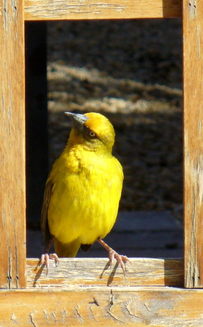 Ploceus capensis Langebaan